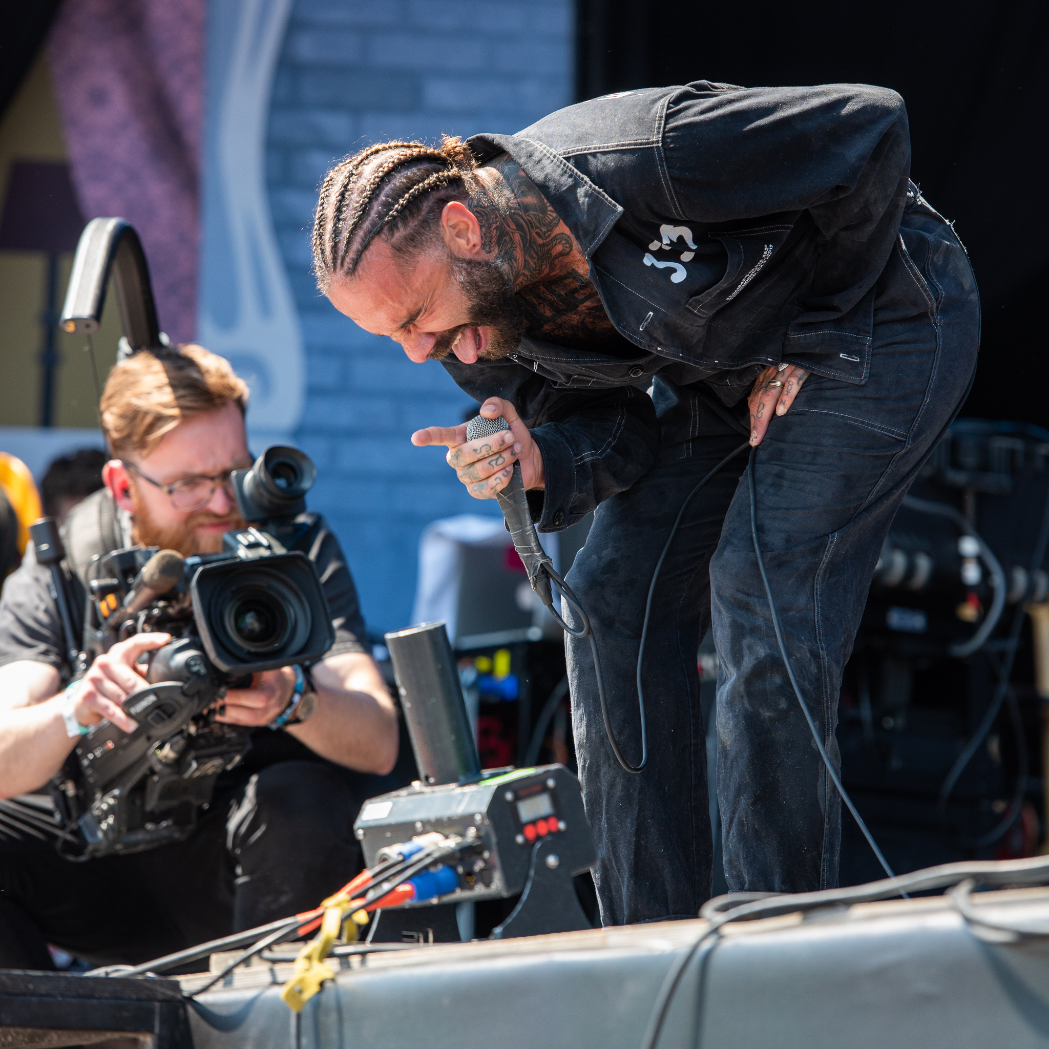 ARGO-Konzerte,Beck's Park Stage,Fever 333,Jason Aalon Alexander Butler,Konzert,Livekonzert,Livemusik,Musik,RiP,Rock im Park 2019